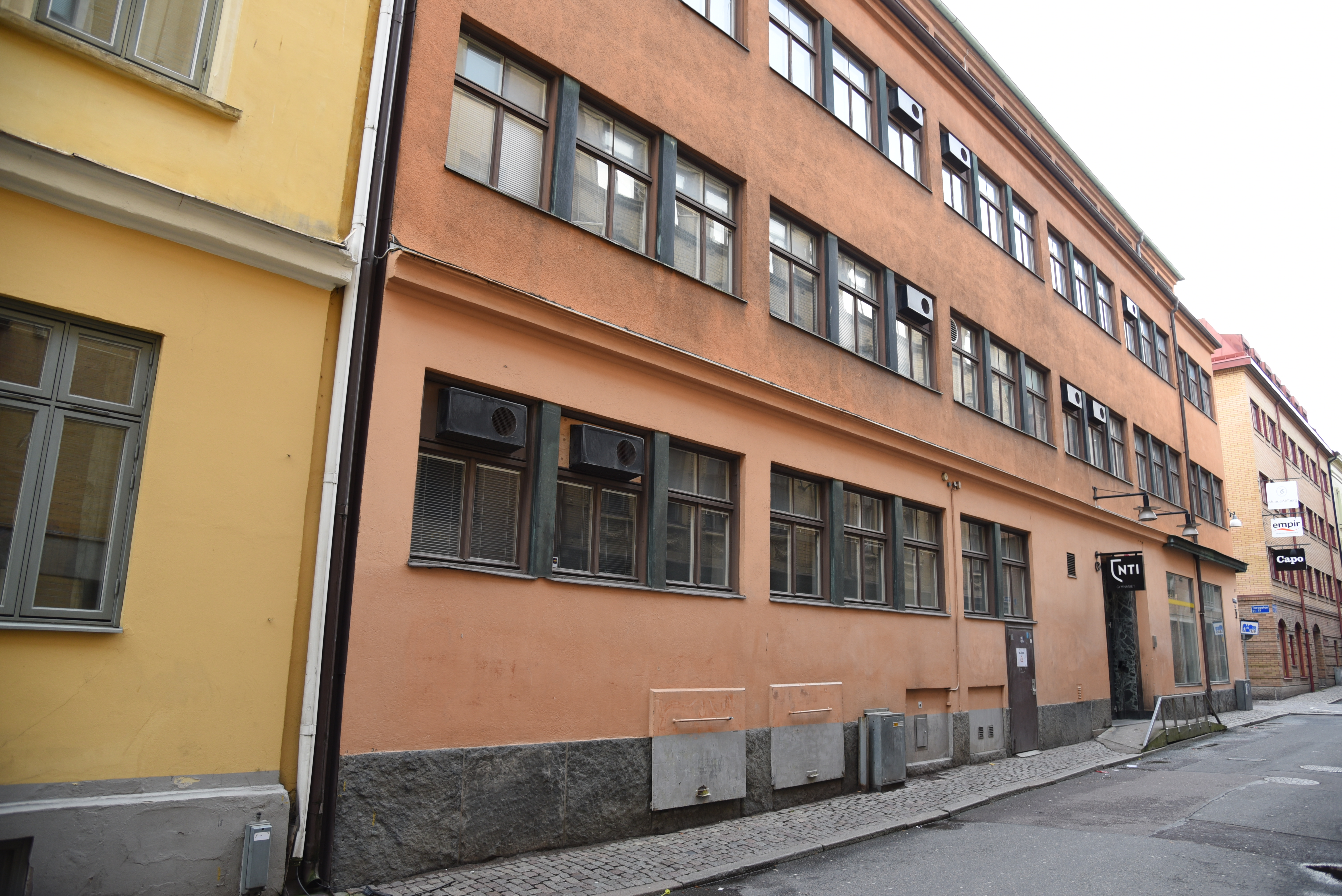 Kronhusgatan 9 i Göteborg. Byggnaden uppförd år 1933 för Franska Choklad- och Konfektfabriken A-B, senare CAP Chokladfabrik AB.